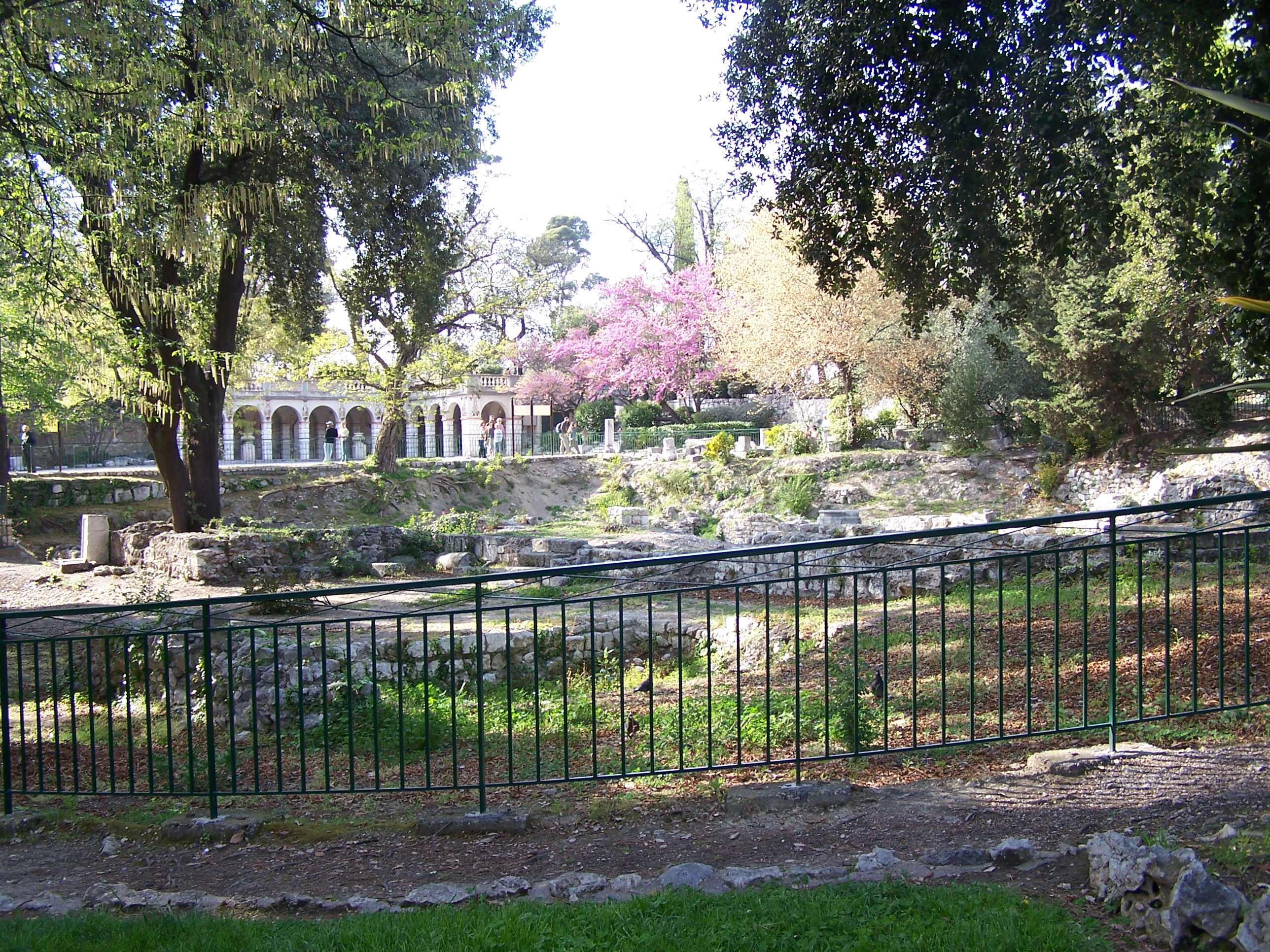 Ruines du Château de Nice